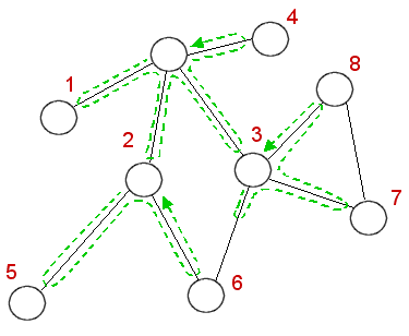 Paieška į plotį